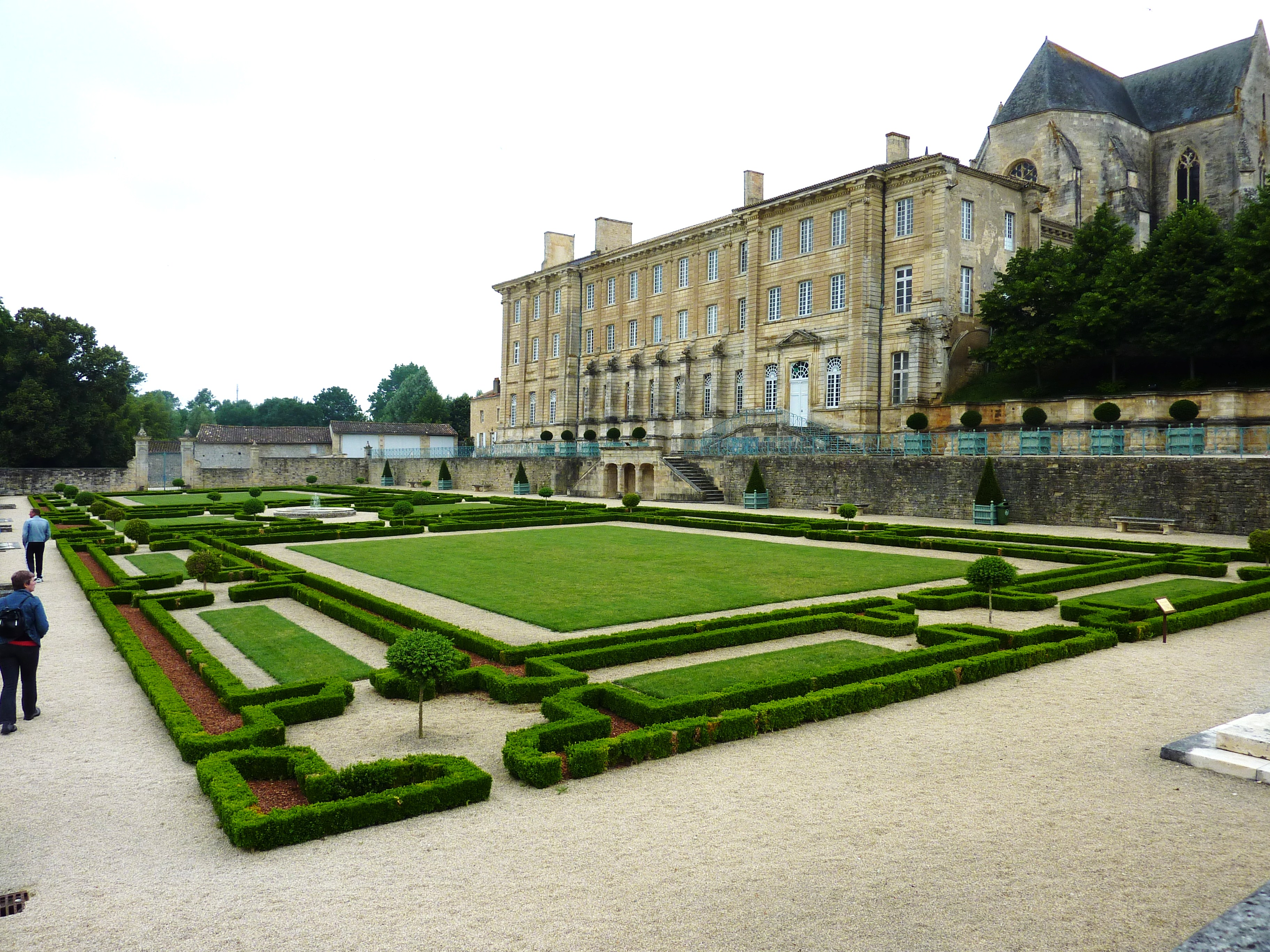 Abbaye royale Notre Dame, ville de Celle sur Belle, département des Deux-Sèvres, France